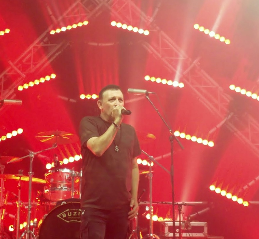 זאב נחמה בהופעה של אתניקס בהיכל התרבות בתל אביב 2017